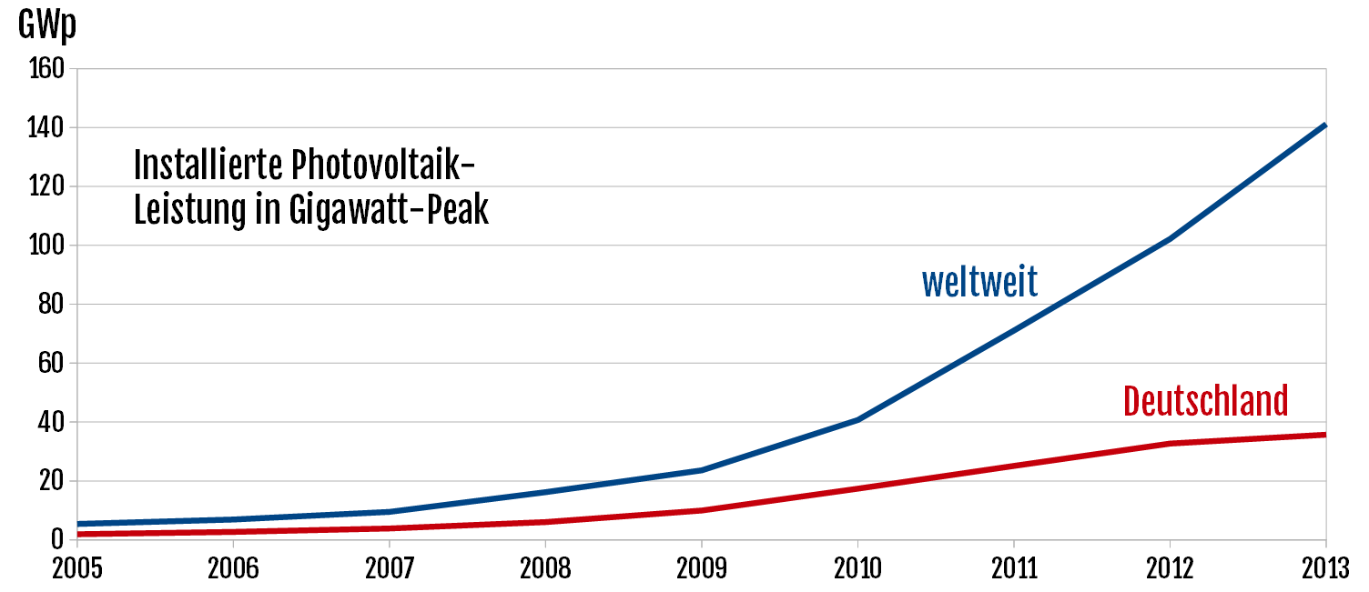 Das Diagramm zeigt den Photovoltaik-Zubau der Jahre 2005 bis 2013 für Deutschland und die Welt an.